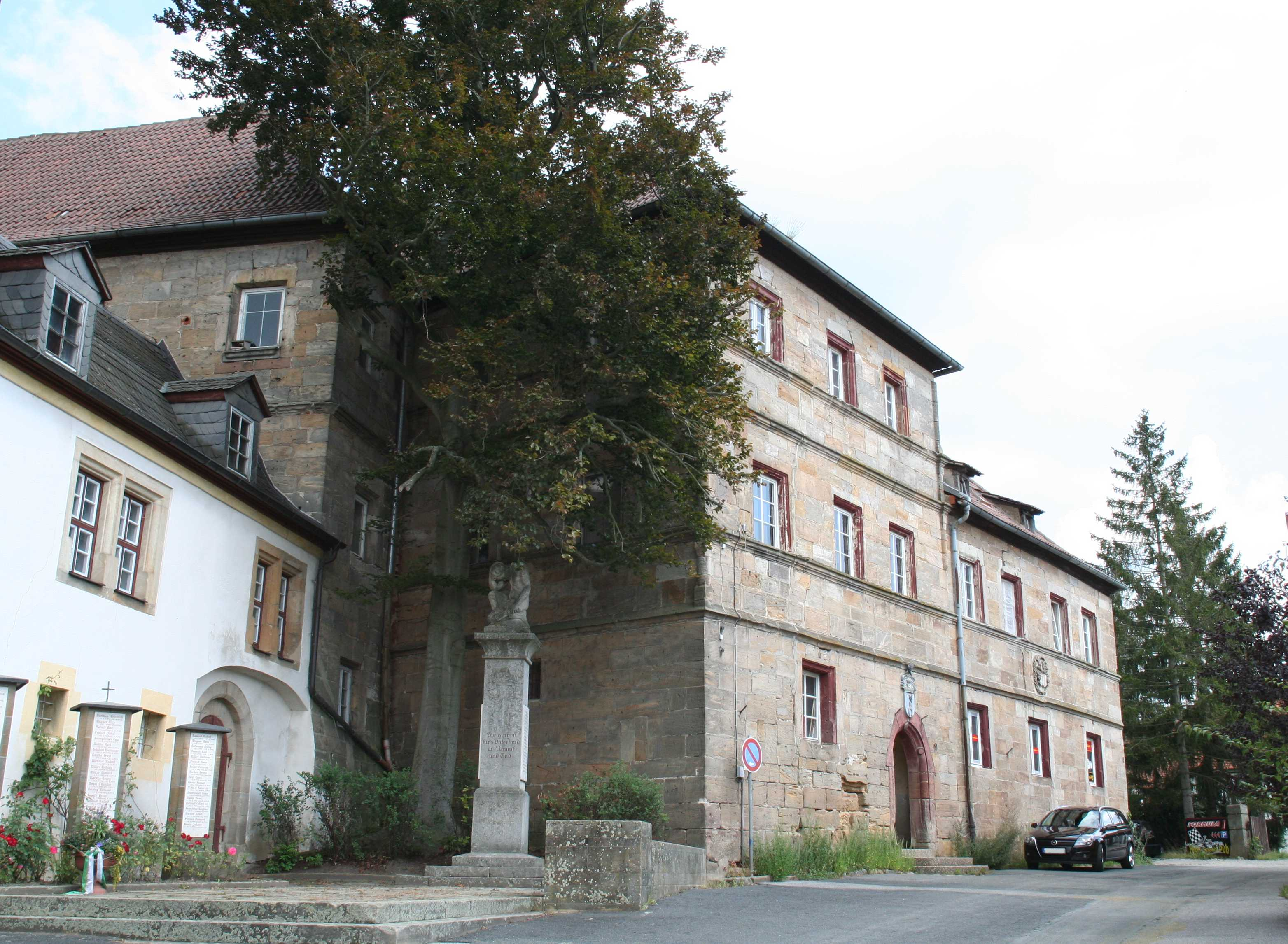 Schloss Redwitz an der Rodach im Landkreis Lichtenfels in Bayern